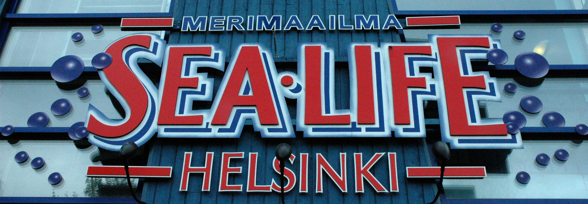 Eingang zum Sea Life Centre in Helsinki